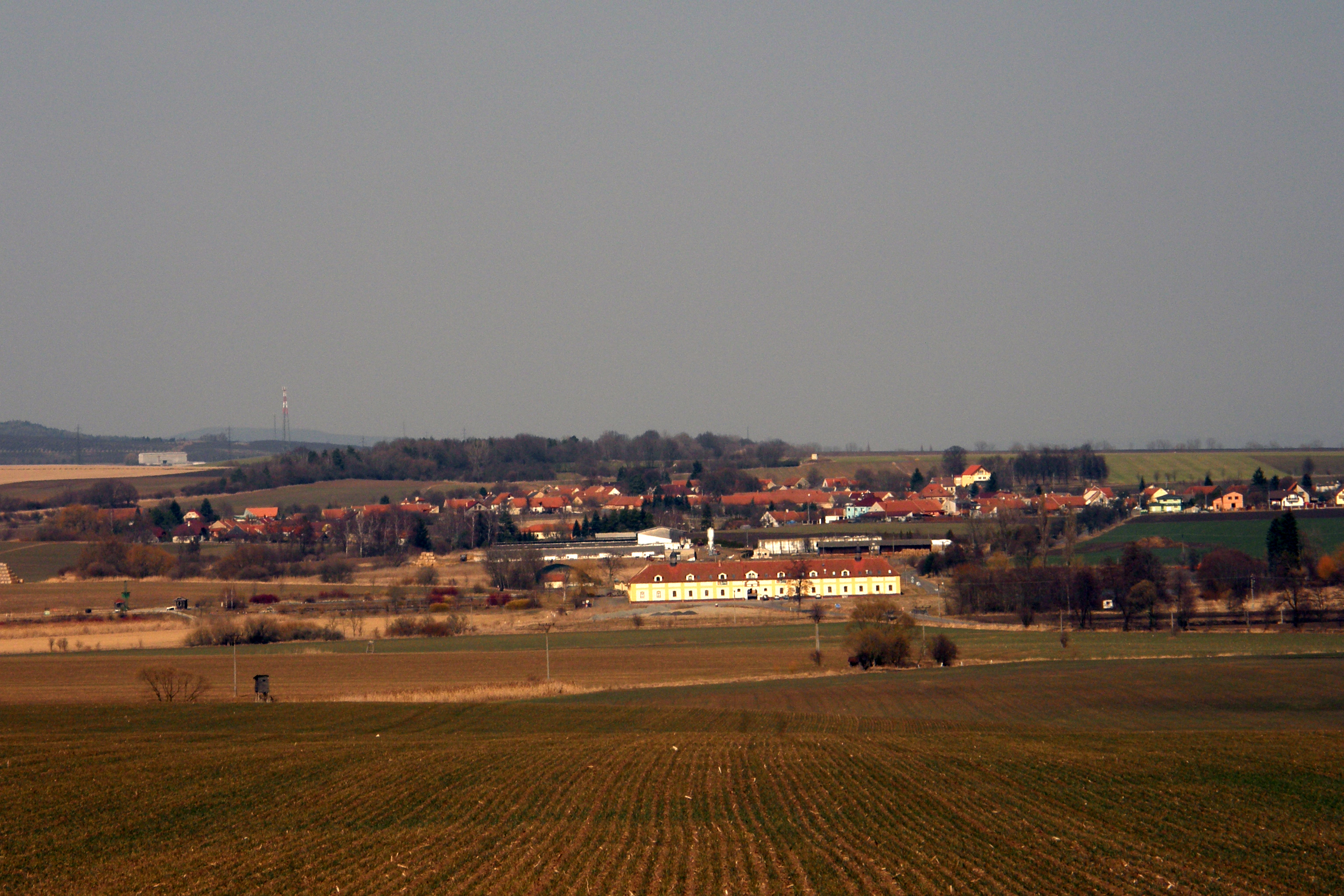 Obec Sudice v okrese Blansko